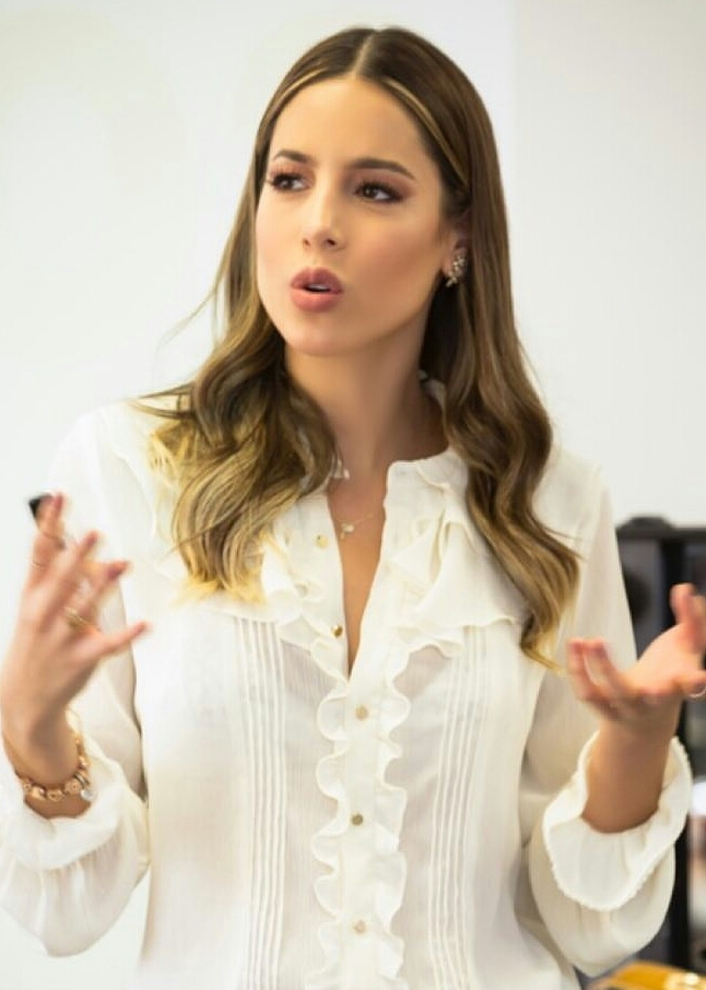 La presentadora y modelo Daniela Vega Mendoza (n. 1992) en un evento en Bogotá, Colombia.